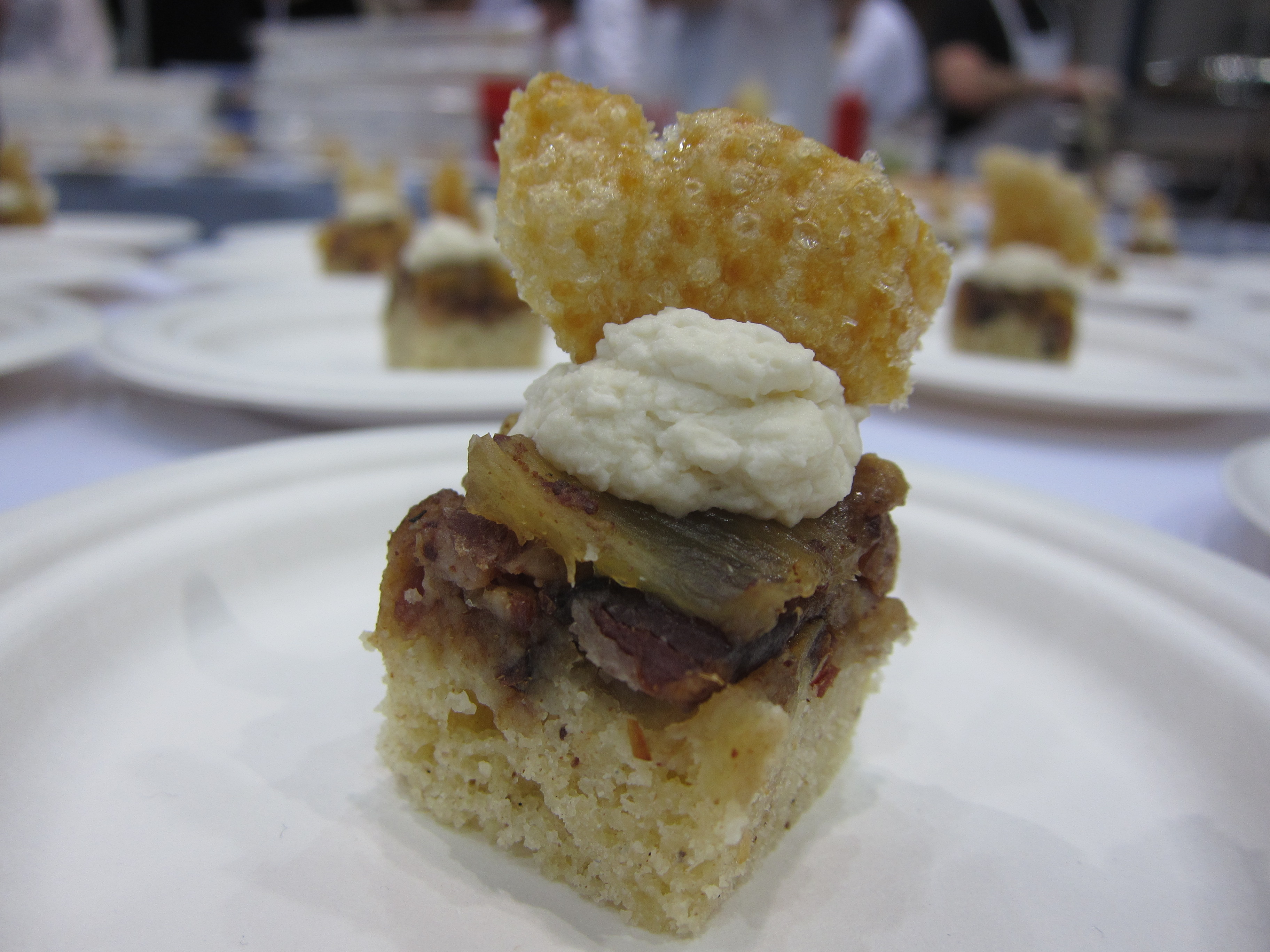 cicchetto gourmet